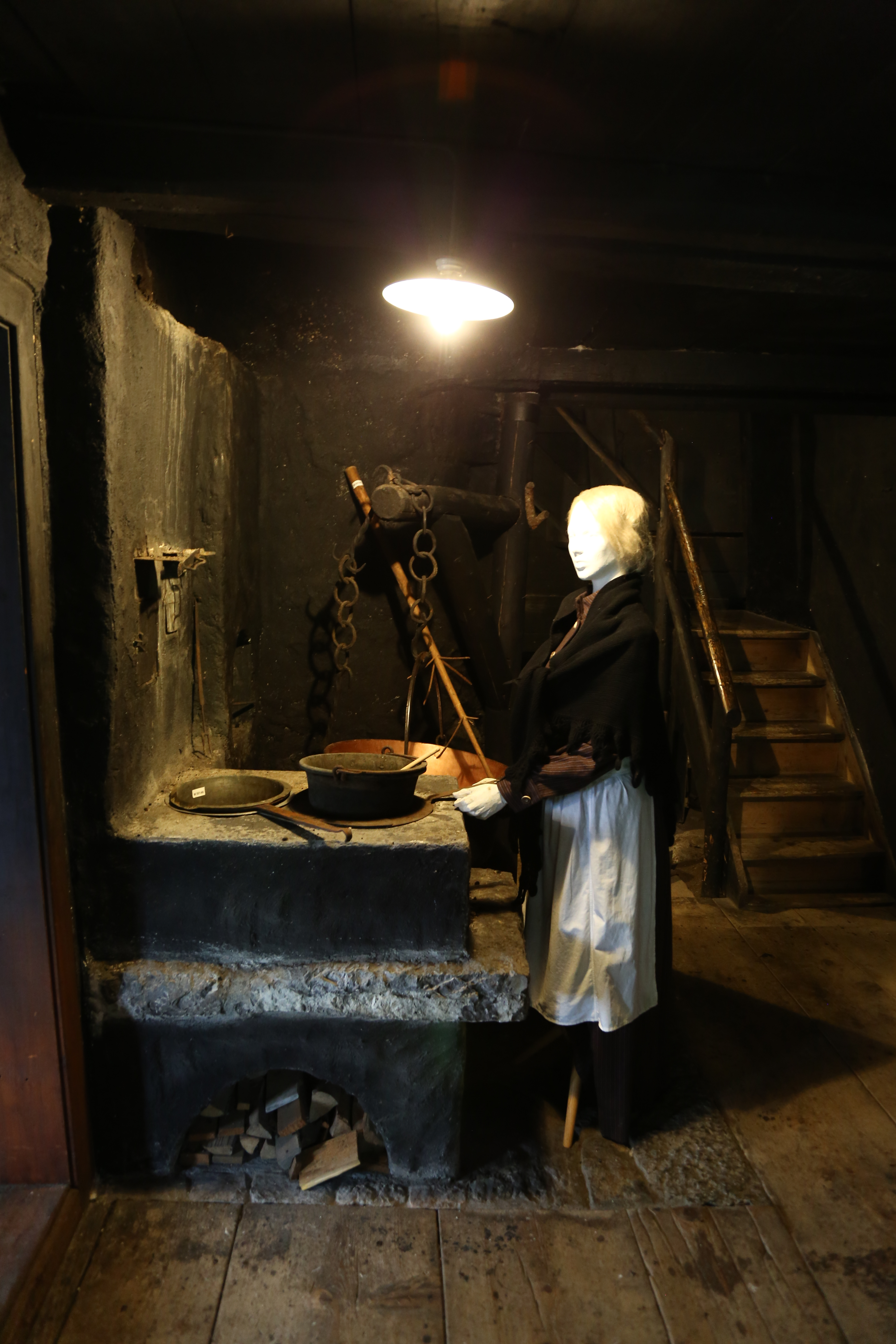 Walserhaus Triesenberg, Innenraum